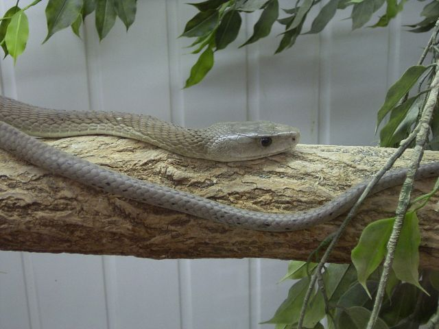 Schwarze Mamba